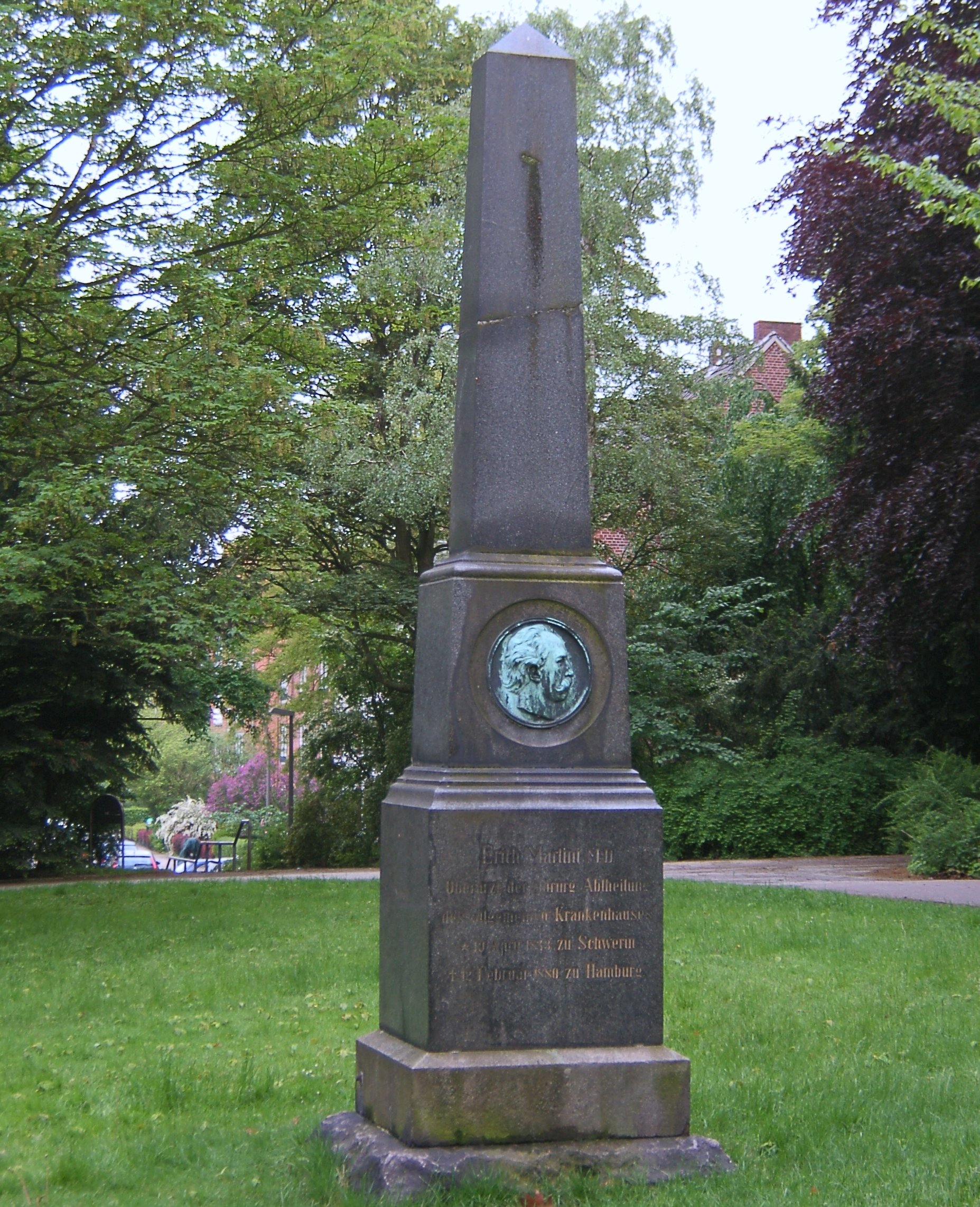 Grabstein für den Chirurgen Erich Martini († 1880), Oberarzt am Krankenhaus St. Georg, im Jacobipark in Eilbek, dem ehemaligen Friedhof von St. Jacobi.